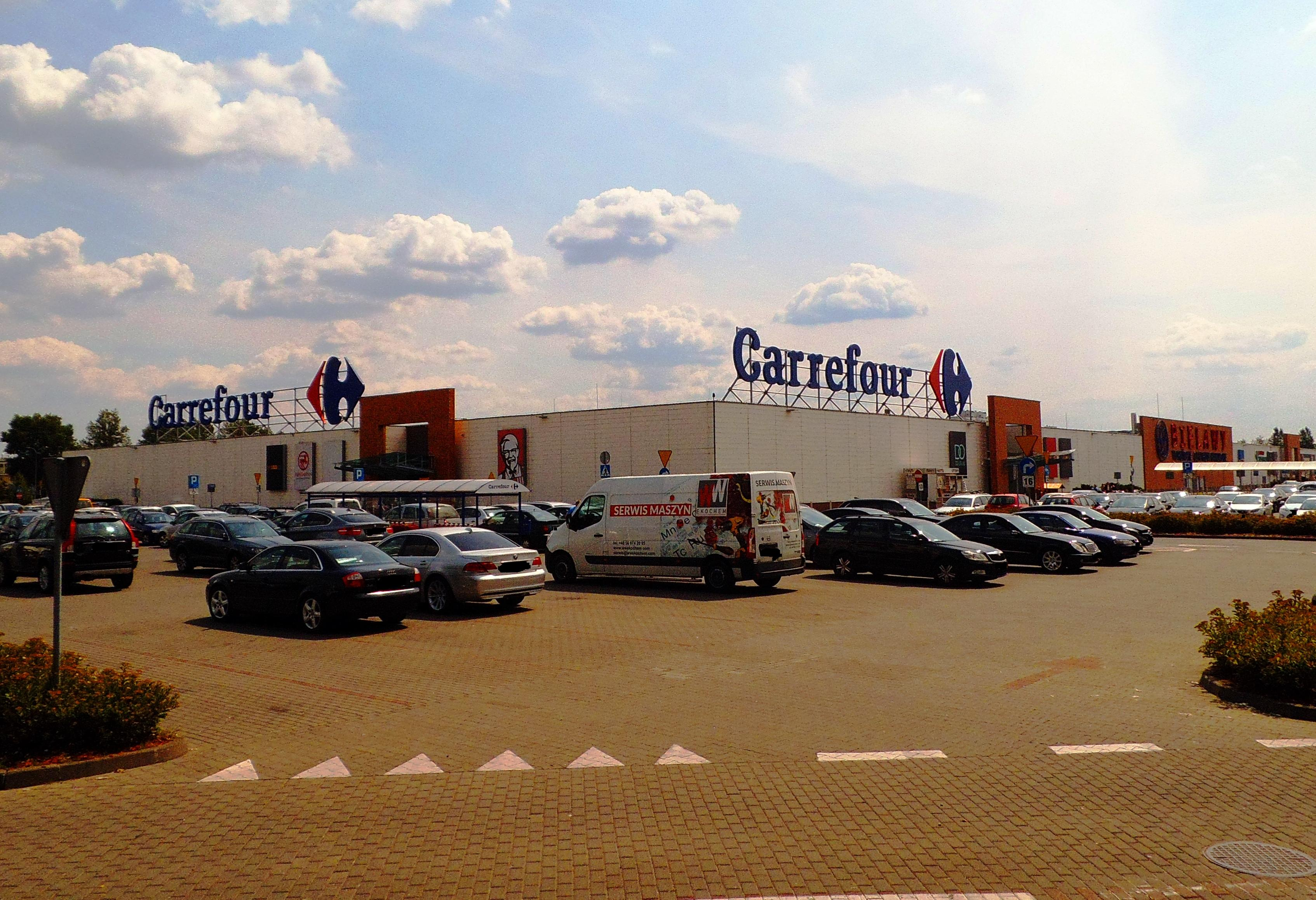 Centrum Handlowe Bielawy w Toruniu1